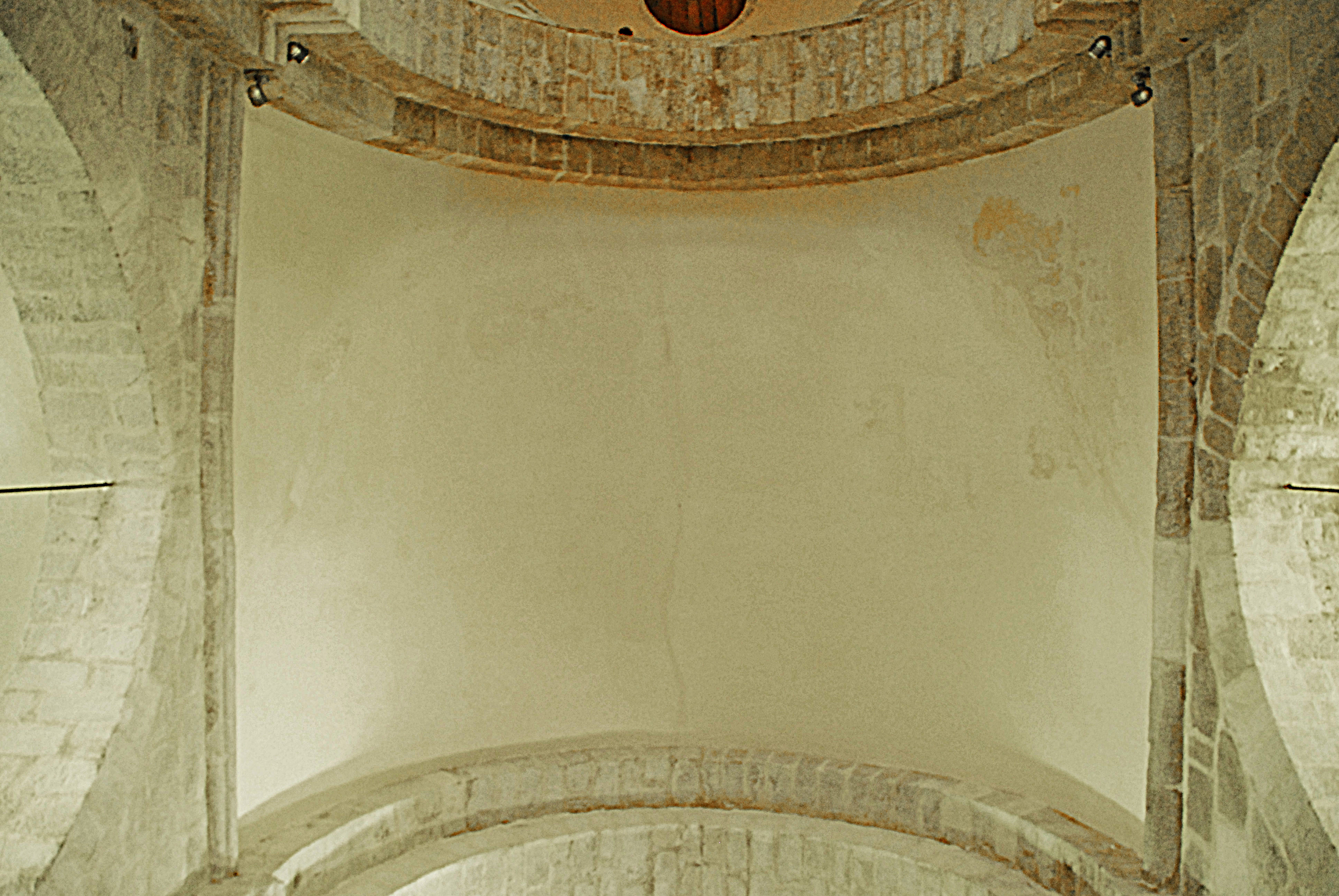 N.-D. de La Souterrain, Tonnengewöbe Mittelschiff, Joch 3